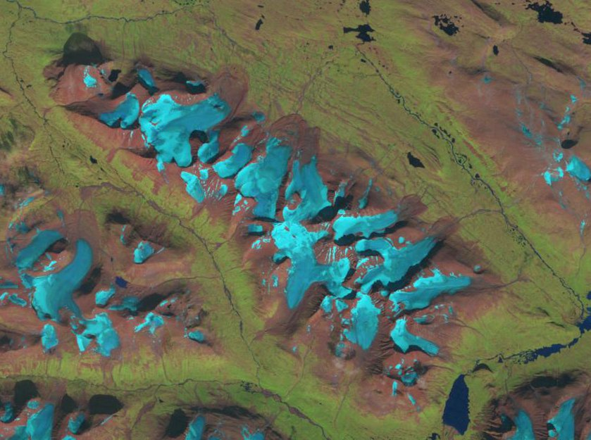 Photo Landsat du 19 août 2006 du massif du Sarektjåkkå (point culminant : Stortoppen, 2 089 m).